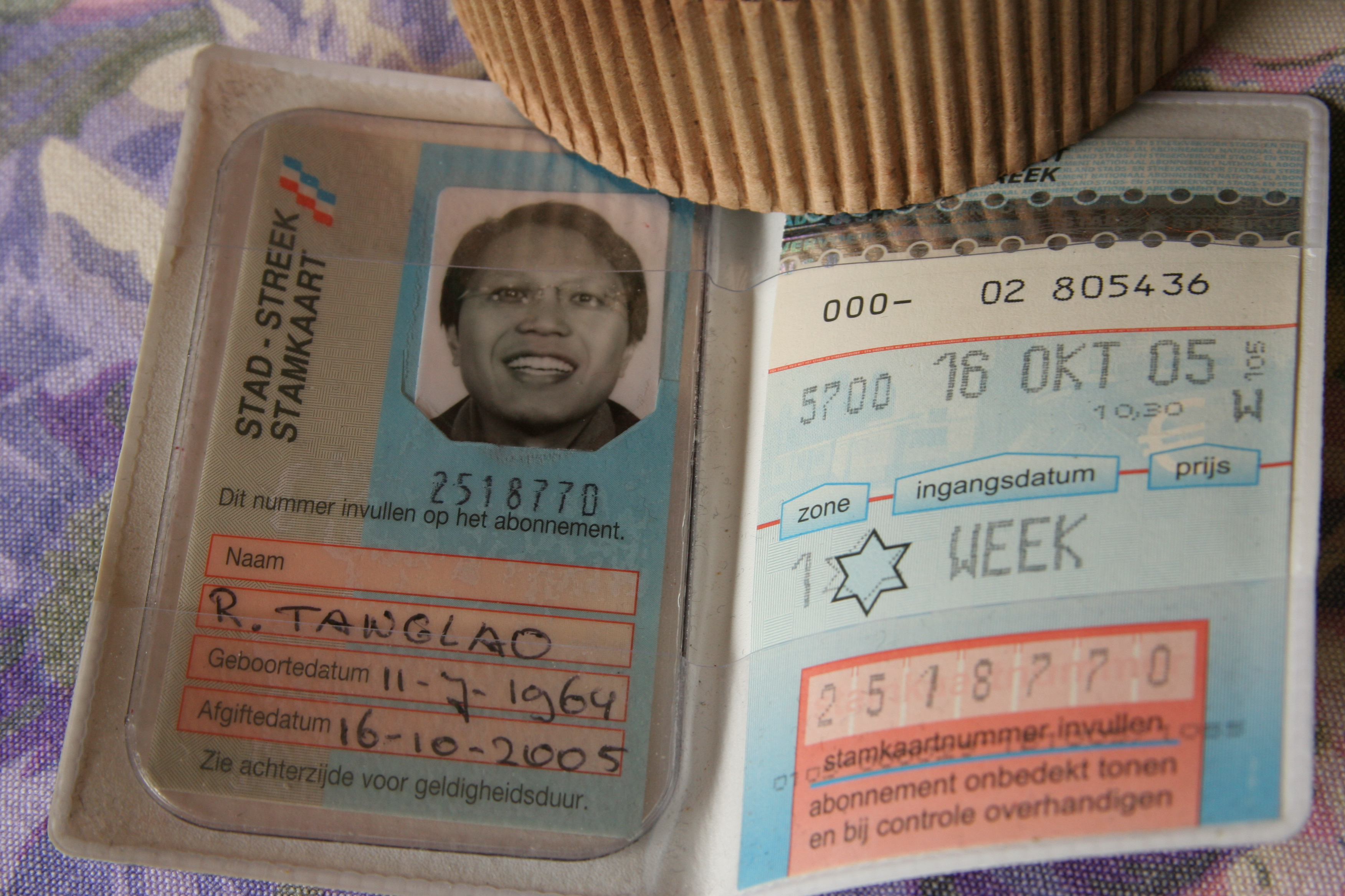 My AMS Transit 1 week pass